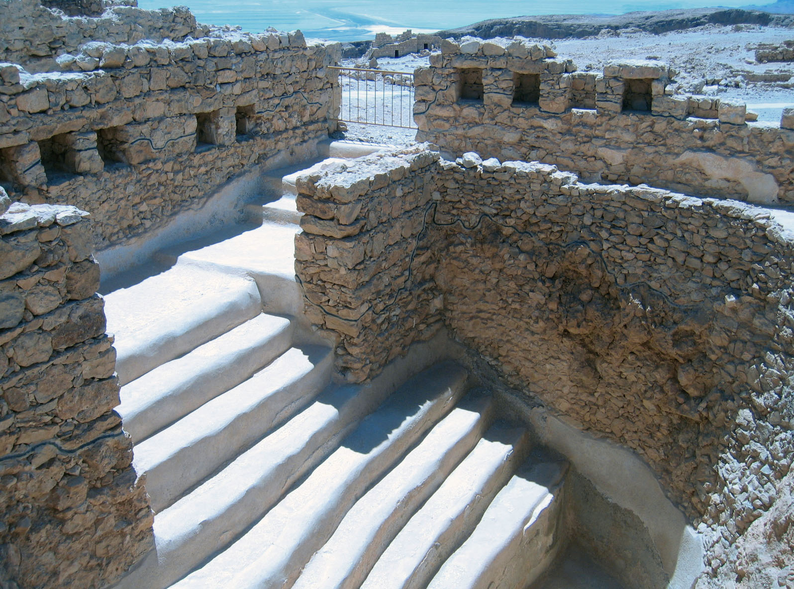 בריכת טבילה ציבורית שנחצבה וטוייחב התקופת המרד. בצמוד לבור נמצא "חדר מלתחה" שבקירותיו גומחות להנחת חפציםץ